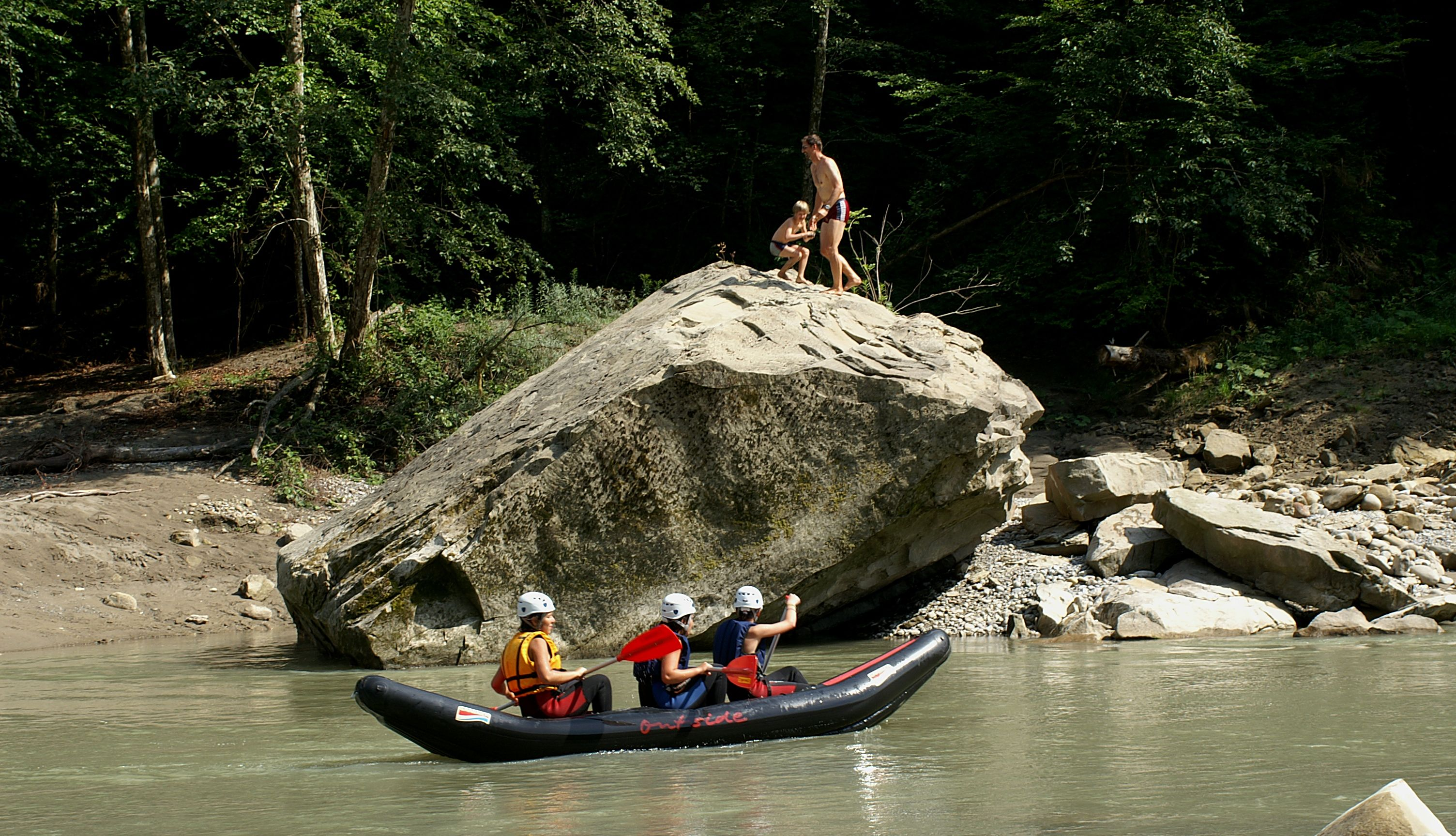 Rafting auf der unteren Bregenzer Ache - km69 - (Wolfurt, Kennelbach) Länge 9,5km, Schwierigkeitsgrad WW I-II